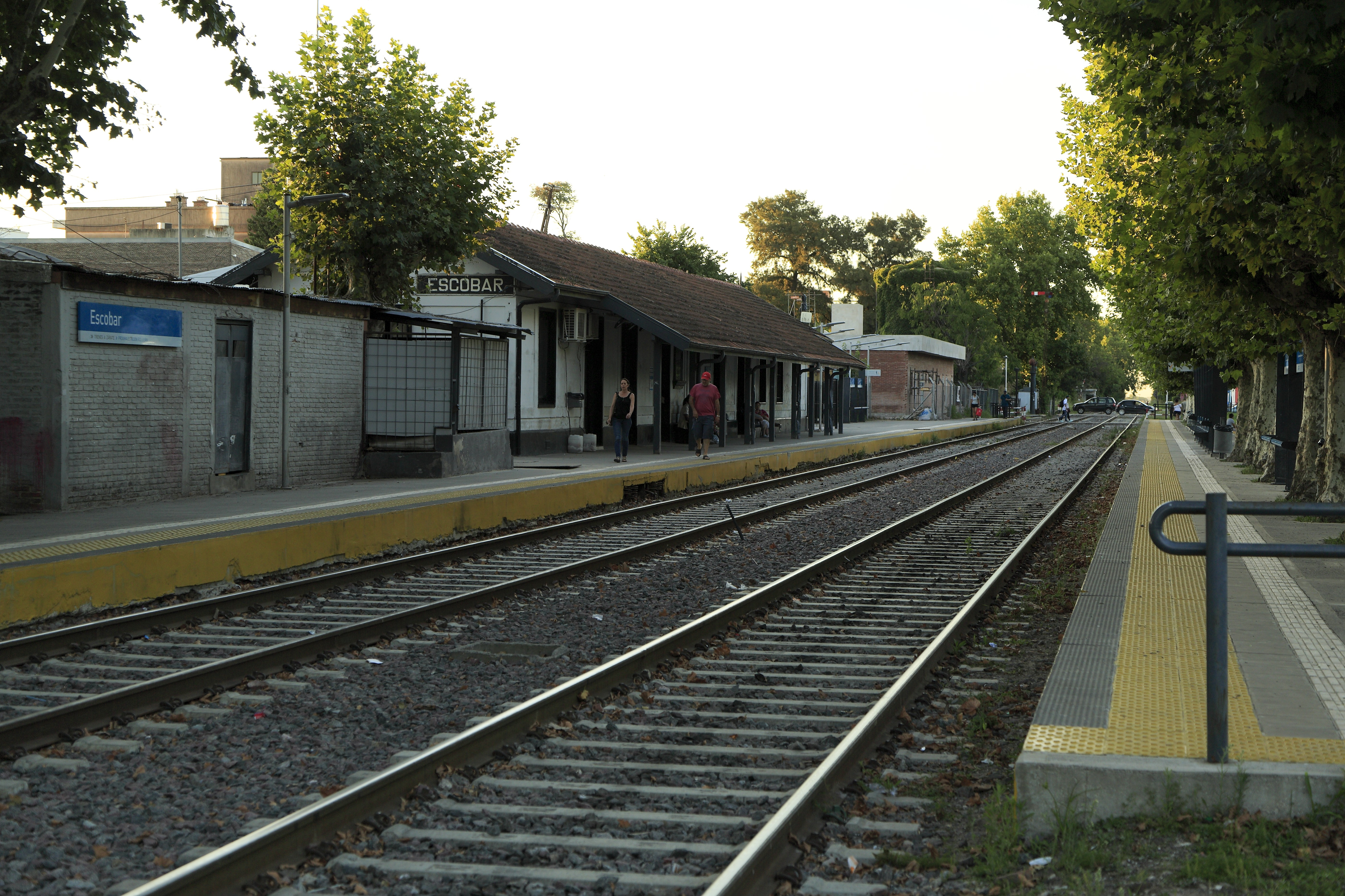 Richtung Zárate (–Rosario), die Strecke wurde in den letzten Jahren zu großen Teilen saniert. Entsprechend gut ist der Oberbauzustand, abgesehen von Brücken mit offener Fahrbahn und noch nicht umgebauten Weichen ist fast durchgehend Oberbau W vorhanden. Der Name der Stadt Belén de Escobar wurde am Bahnhof zu Escobar verkürzt.Der vergitterte Vorbau am Schuppen links ist der Standort des mechanischen Hebelwerkes, die Öffnung in der Bahnsteigkante davor ist die Gruppenablenkung.